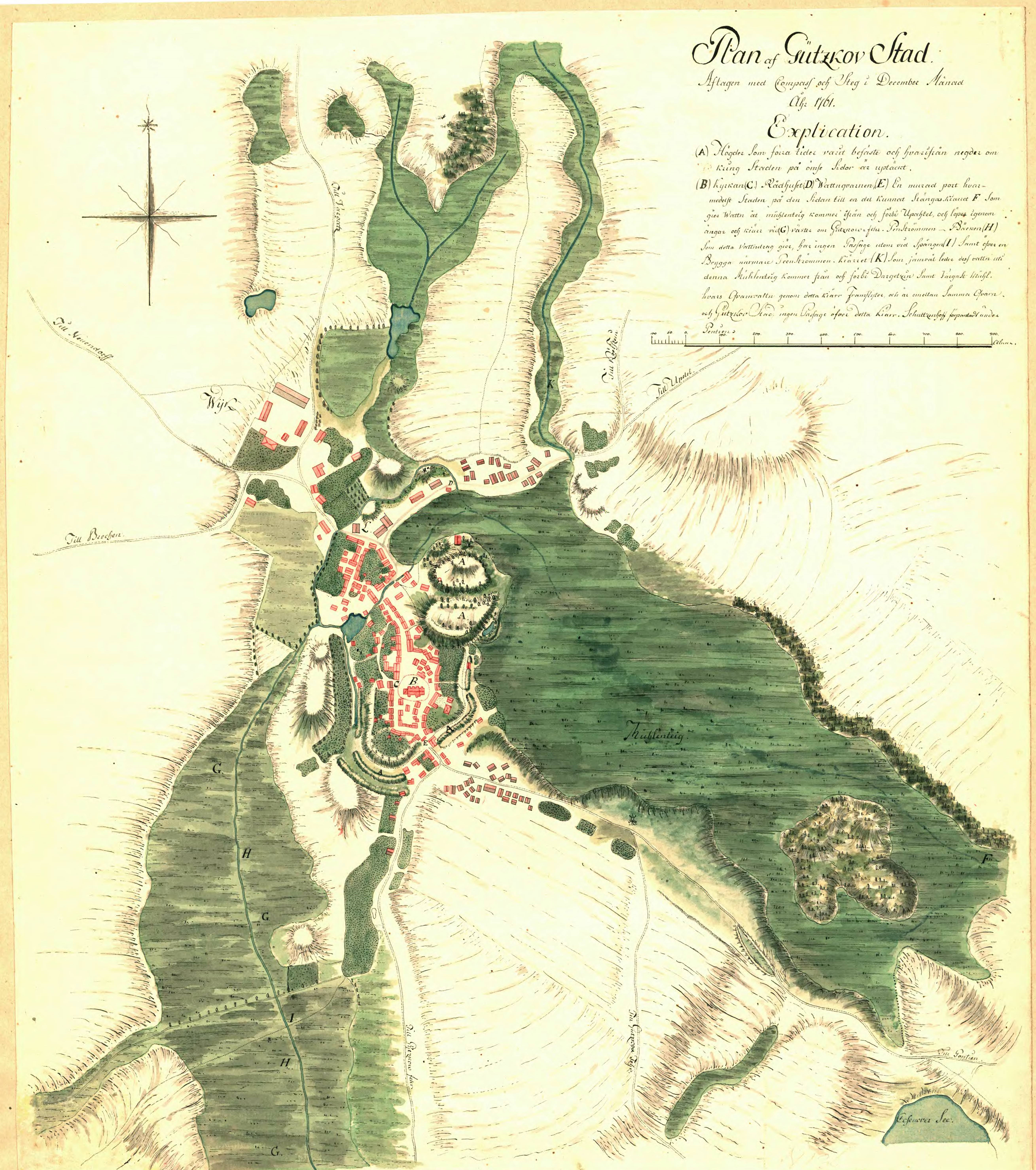 Citymap of Gützkow